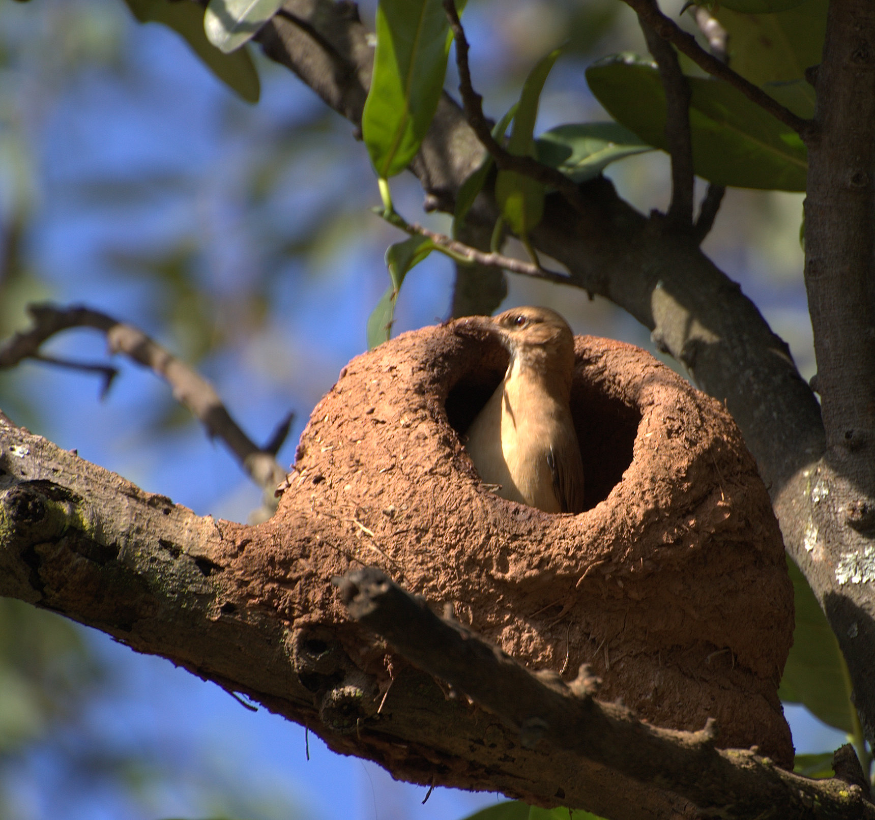 SÉRIE JOÃO-DE-BARRO Parque da Independência, Museu do Ipiranga, São Paulo